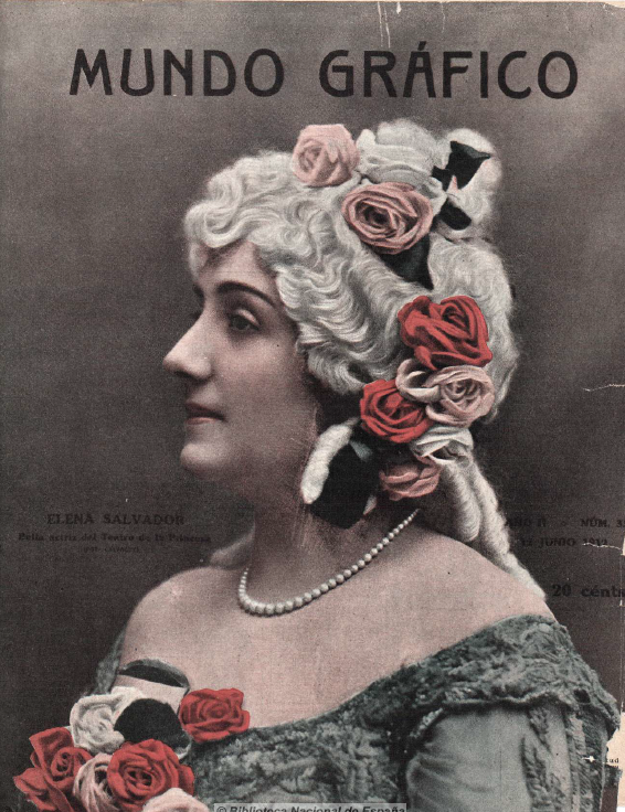 Fotografía de la actriz española Elena Salvador publicada en la portada de Mundo Gráfico en 1912